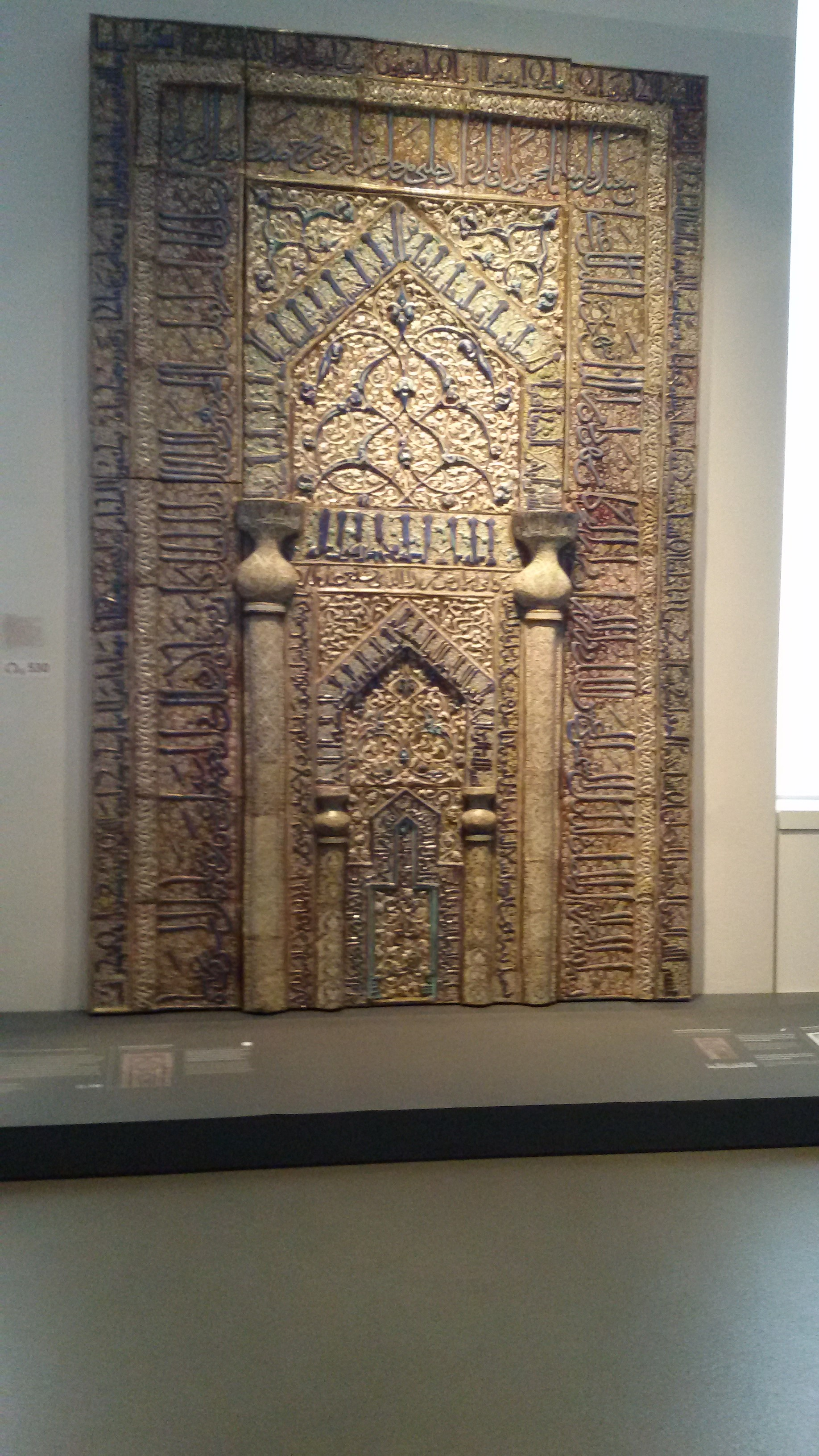 മുസ്ലീം പള്ളി കവാടം